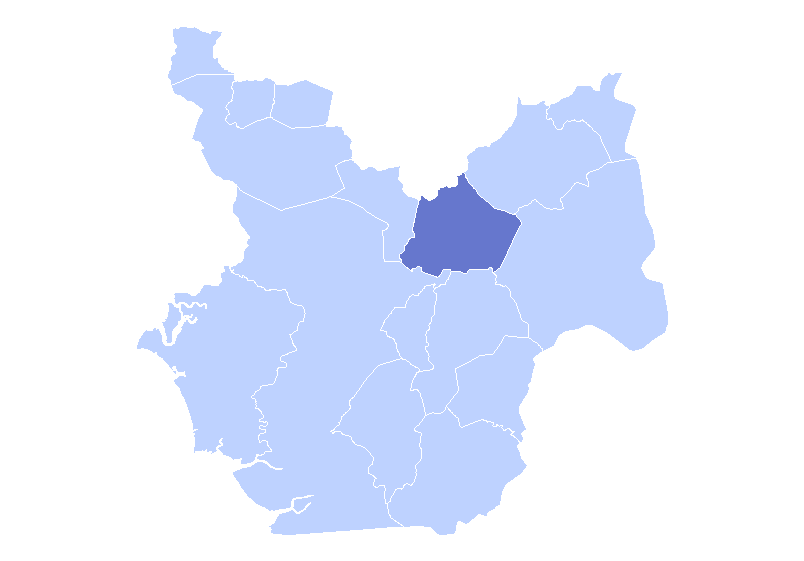 Położenie gminy Apacilagua na mapie departamentu